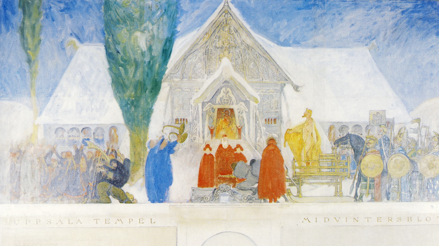 Carl Larsson, Midvinterblot, skiss 2, 1913. Olja på duk, 202 x 341 cm.